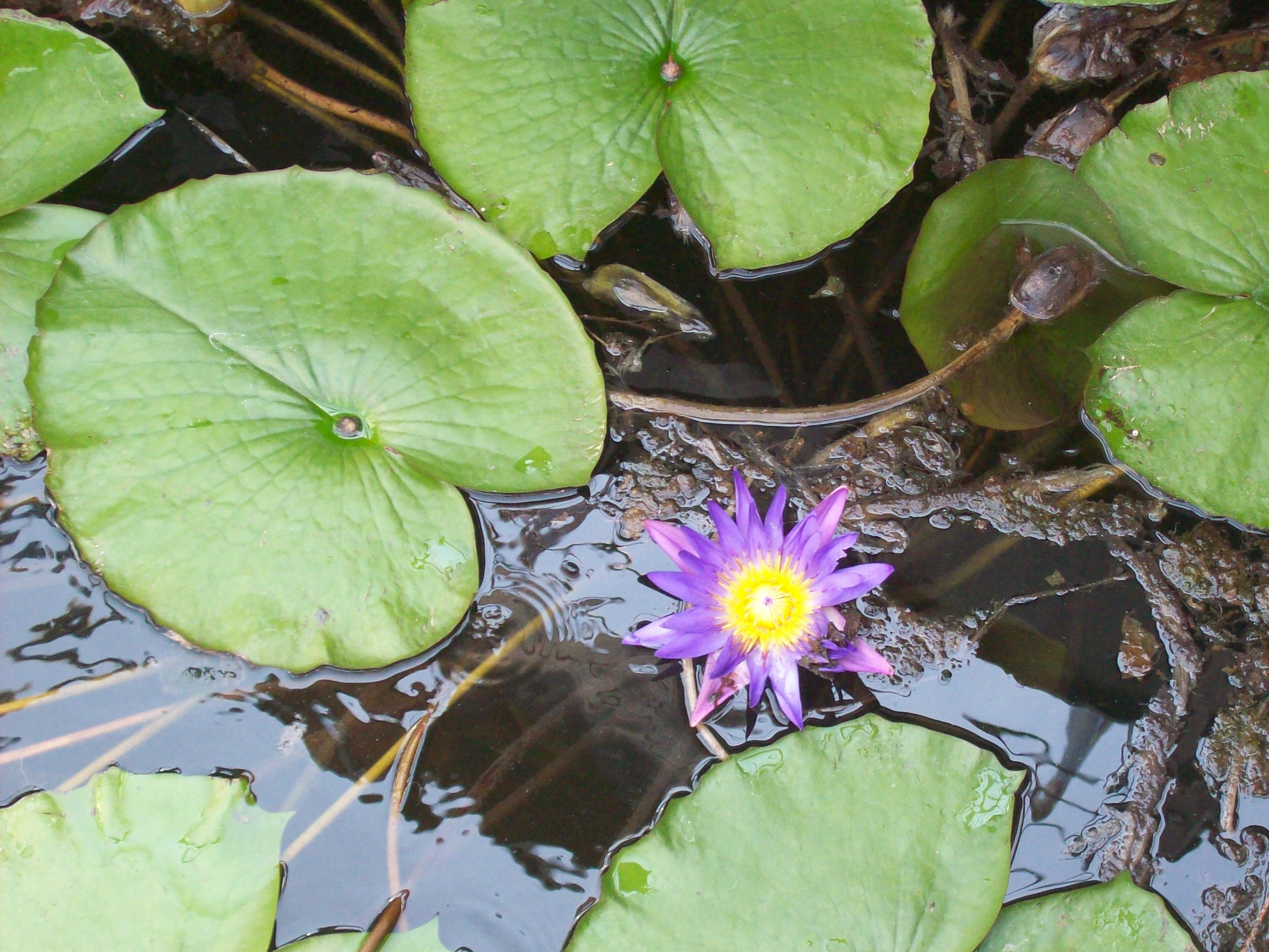 Hévízi-tó (Magyarország) - vörös tündérrózsa